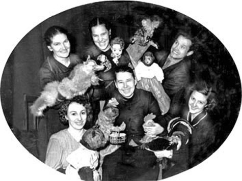 Антонина Емельяновна Шикова — одна из организаторов Белгородского театра кукол. 1962 (?)